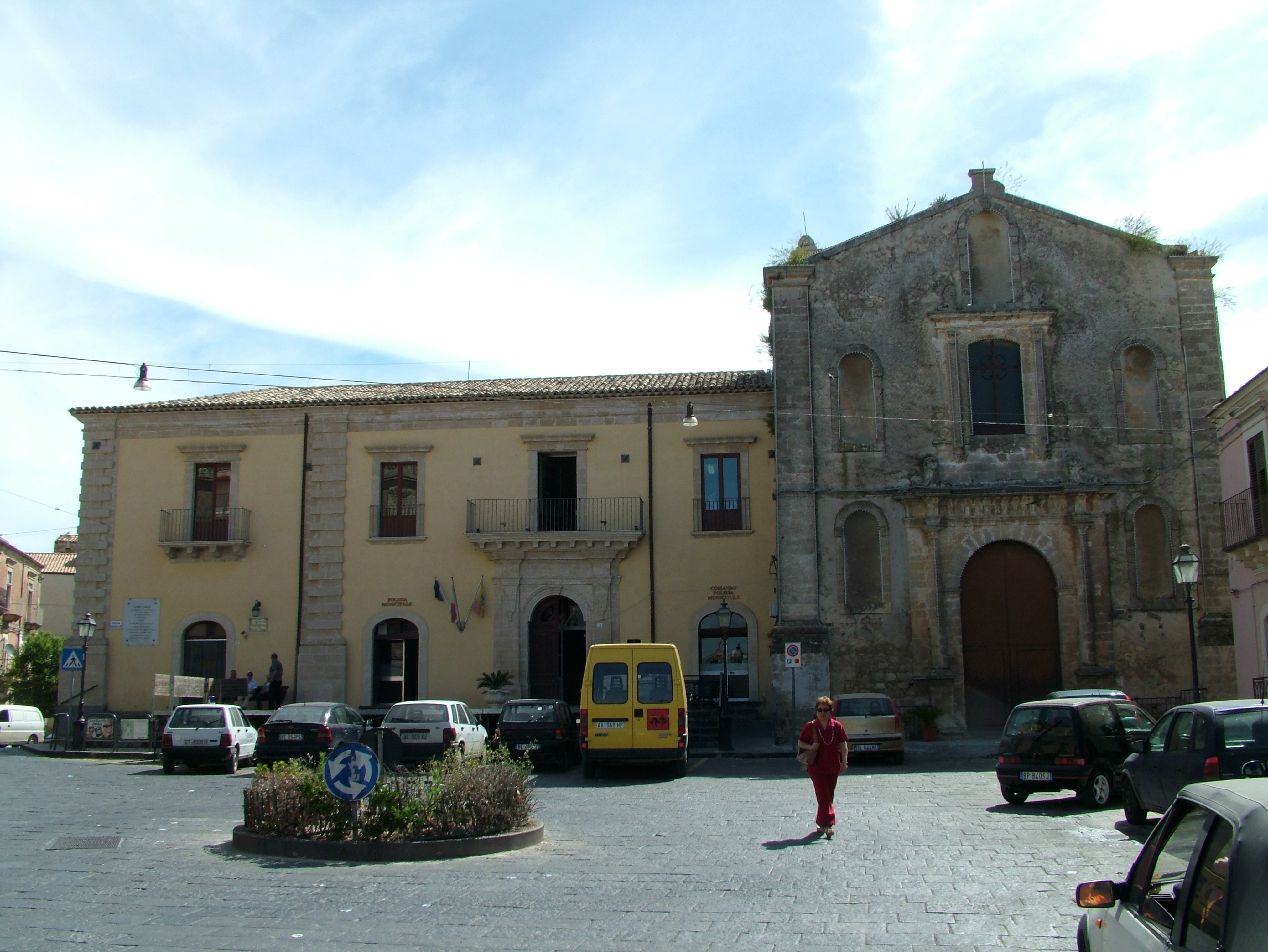 Licodia Eubea, Sizilien, Rathaus und Chiesa del Rosario